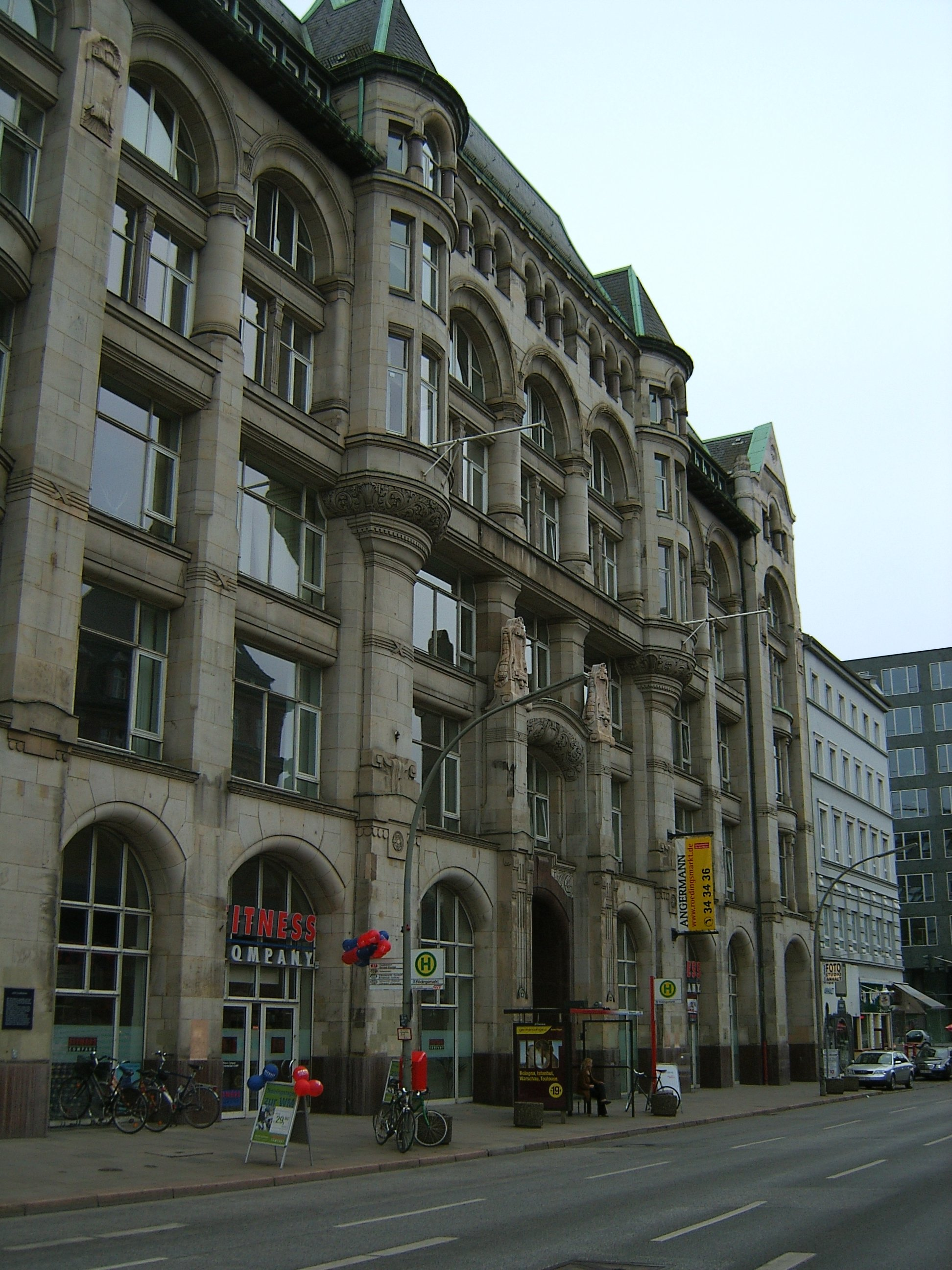 Das Alte Klöpperhaus am Rödingsmarkt 9 wurde von 1902 bis 1904 nach Plänen von Lundt & Kallmorgen für den Wollhändler Klöpper erbaut. Die romanisierende Granit- und Sandsteinfassade hat Werke von Henry Hobson Richardson zum Vorbild. This is a photograph of an architectural monument.